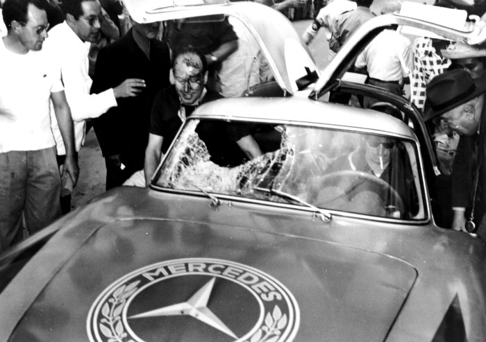 At the Carrera Panamericana in Mexico, the 300 SL won with Karl Kling and Hans Klenk- despite a vulture flying through the windscreen.[1] Bildbeschreibung: MB 300 SL Sportwagen, Carrera Panamericana - Mexico_1952 Quelle: Mediaseite der DaimlerChryslerAG Genehmigung: Gern können Sie für Ihre Tätigkeit für die Wikipedia Inhalte der DaimlerChrysler Medienseiten verwenden. Dazu erkennen wir die Bedingungen nach GNU-FDL an. Das Angebot bezieht sich auch auf die vorhandenen Bilder.(Dr.Josef Ernst, Communications, DaimlerChrysler AG)